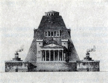 А. Д. Захаров. Проект мавзолея Павла I в Павловске 1802. Ленинград, Музей истории Ленинграда